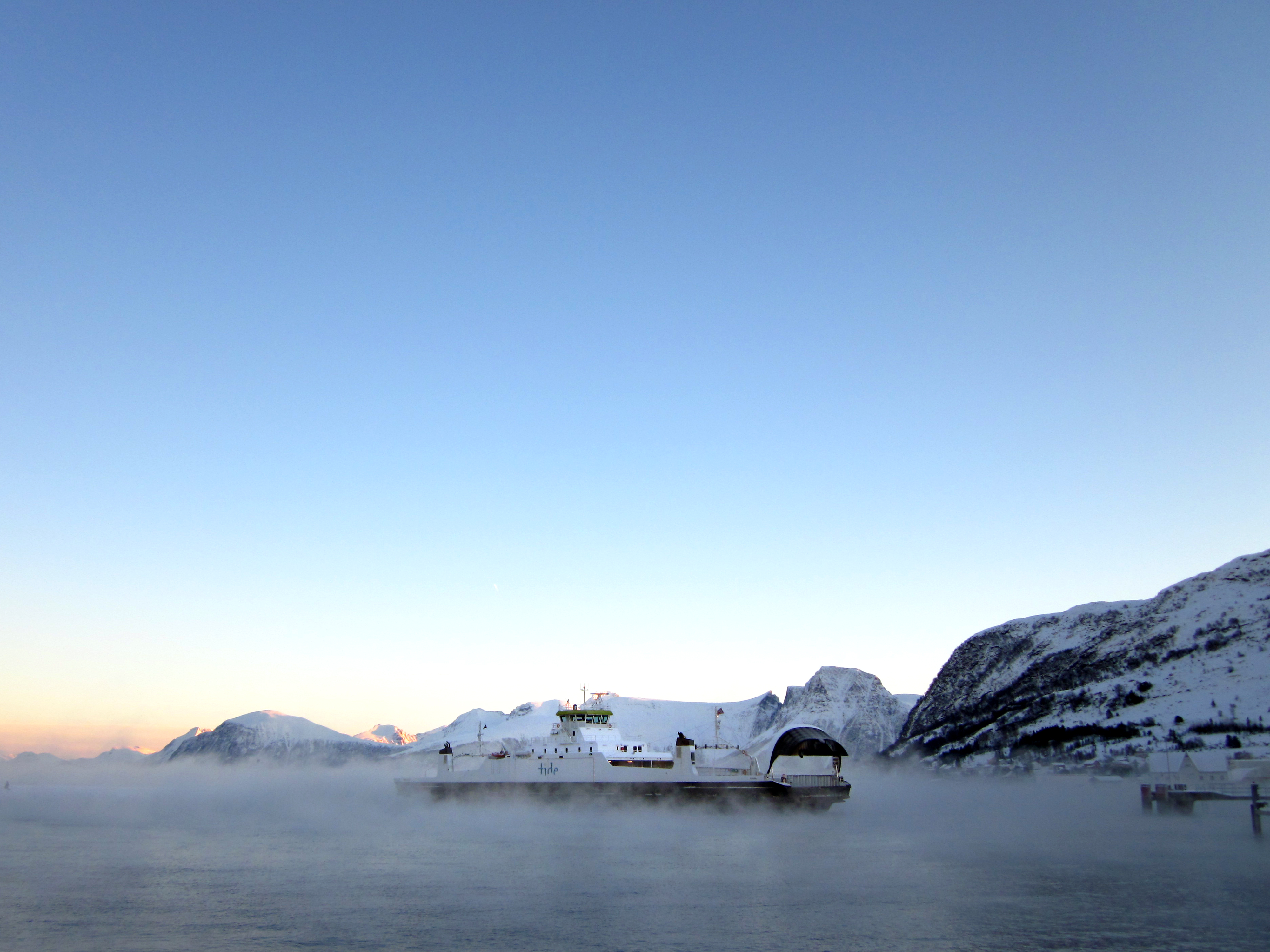 Hareid - Sulesund